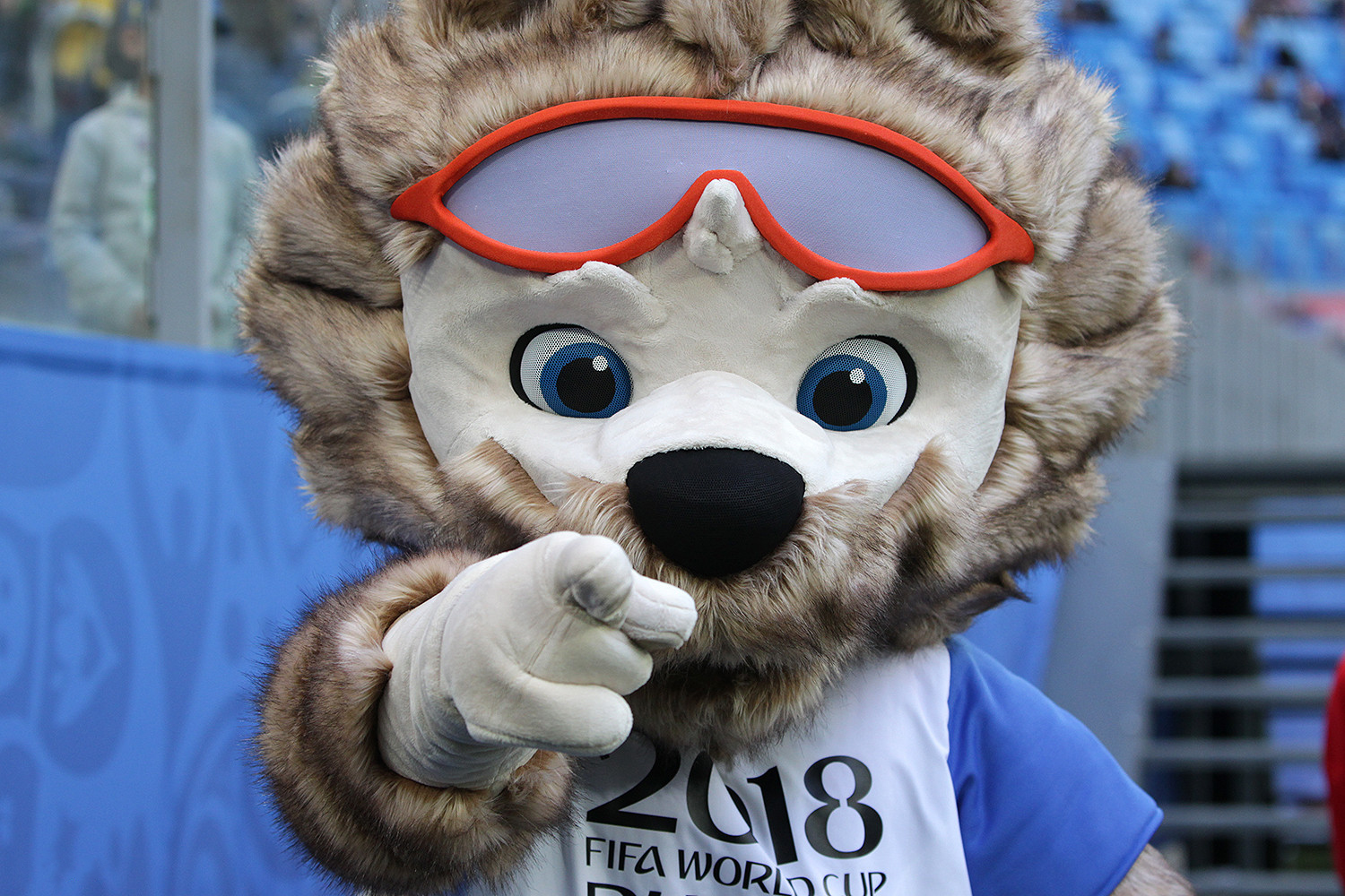 Камерун - Австралия